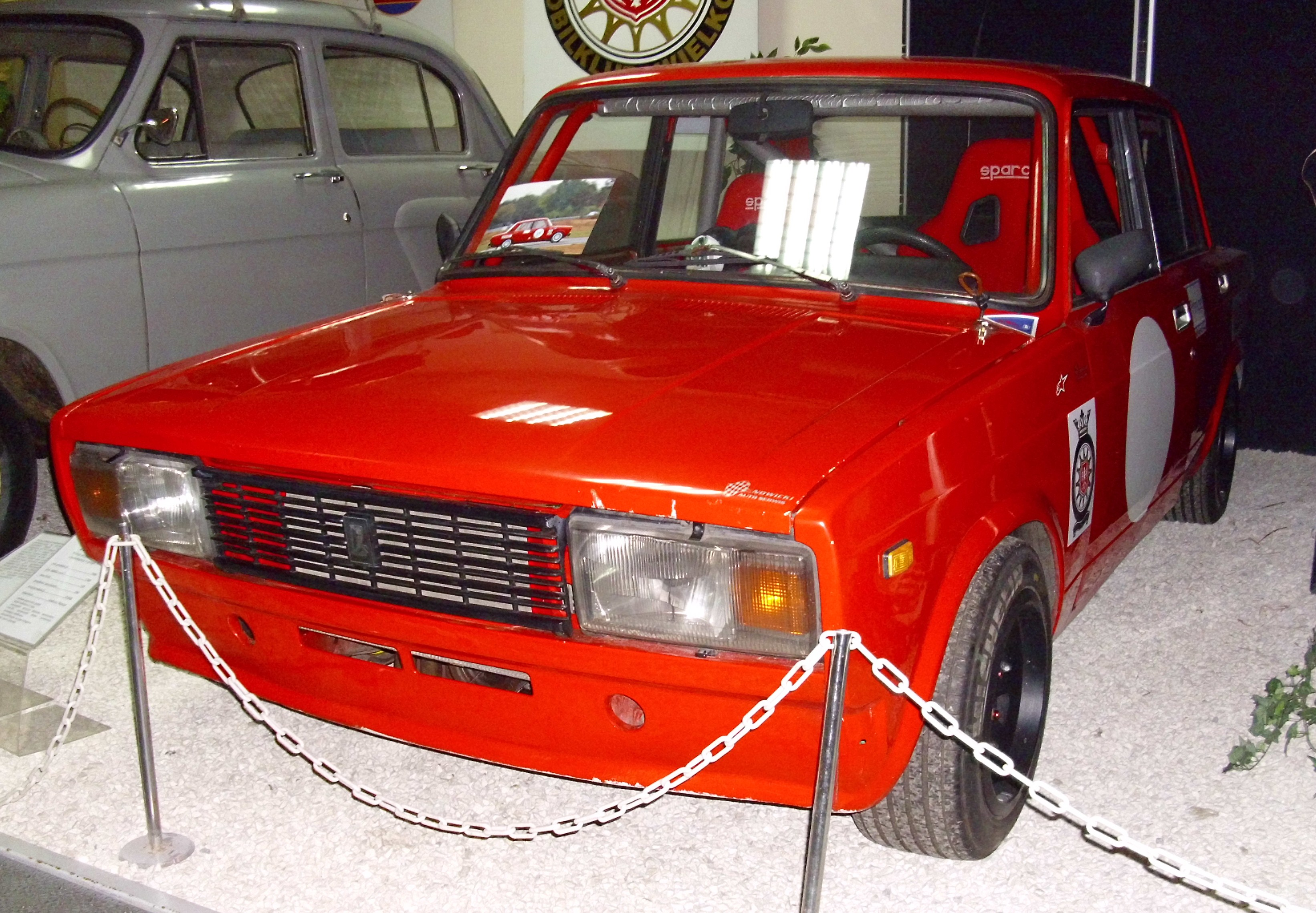 Lada Rennwagen von MTX 1986